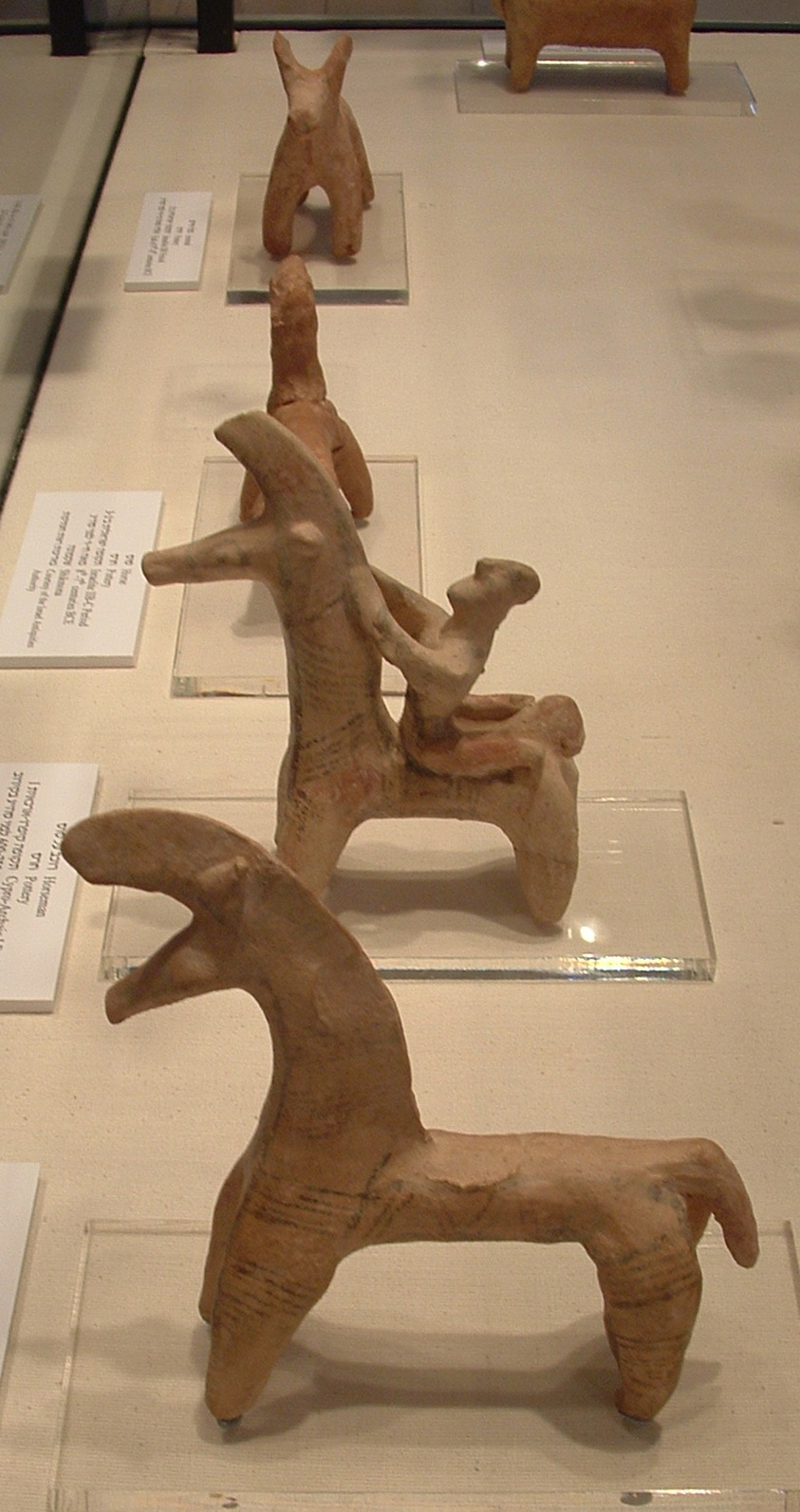 Terracotta figurines in Ancient time - Israeli National Maritime Museum. Haifa צלמיות בעת העתיקה, מאוסף המוזיאון הלאומי הימי בחיפה צלמית היא פסלון קטן ממדים בצלם אדם או בעל חיים. הצלמית יוצרה מחומרים שונים בעיקר טין, אבן ומתכת. על פי הצלמית ניתן ללמוד על מנהגי פולחן , אורחות חיים ומנהגים של התרבויות השונות לאורך ההיסטוריה. מקום הימצאן הפיזי כפי שהן נמצאות בעת חפירה ארכאולוגית מאפשר הסקת מסקנות לגבי השימושים של הצלמיות כגון, חפצי קדושה, קמע פוריות, קמע מזל ועוד. הצלמיות הקדומות ביותר במזרח הקרוב הופיעו בתקופה הניאוליתית קדם-קראמית (מחצית האלף ה-9 לפנה"ס – ועד סוף האלף ה-6 לפנה"ס) This image was taken as part of the Wikipedia Loves Art project and is uploaded curtesy of the National Maritime Museum in Haifa. In any use of this image credit need be given to the Musuem as well as the photographer. The copyright holder of this file allows anyone to use it for any purpose, provided that the copyright holder is properly attributed. Redistribution, derivative work, commercial use, and all other use is permitted. This image was taken as part of the Elef Millim project trip and within the Wikipedia Loves Art project to the National Maritime Museum in Haifa in the northern part of Israel, which was held on Friday, 22nd January 2010. To view all images uploaded as pary of the Elef Millim Project צלמיות חרס. למטה סוס, מעליו רוכב על סוס מהתקופה הקיפרו-ארכאית הראשונה 750-600 לפני הספירה בקירוב. קפריסין